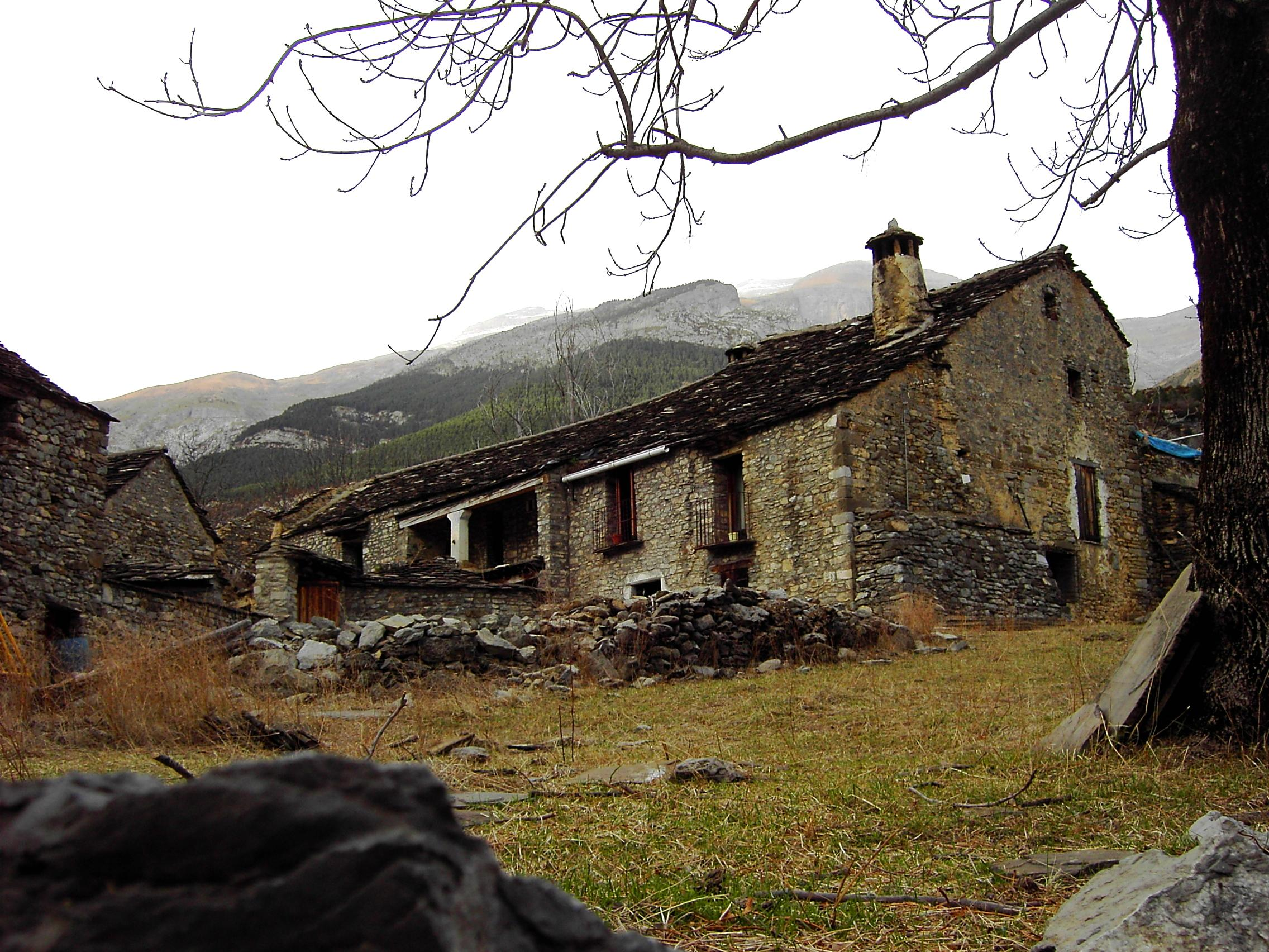 Casas de Escuaín.